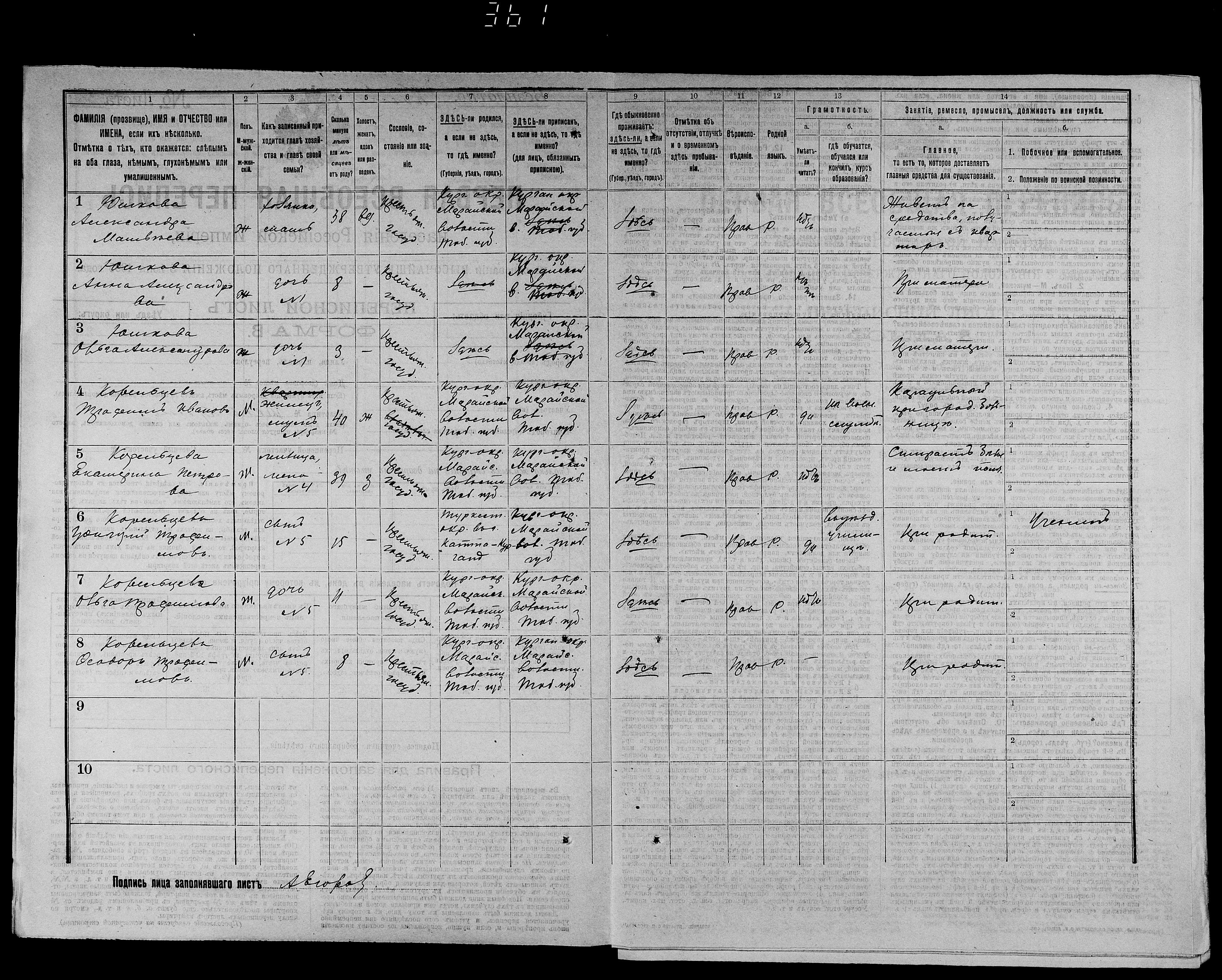 Перепись 1897, Тобольская губерния, г. Курган, семья Корельцевых